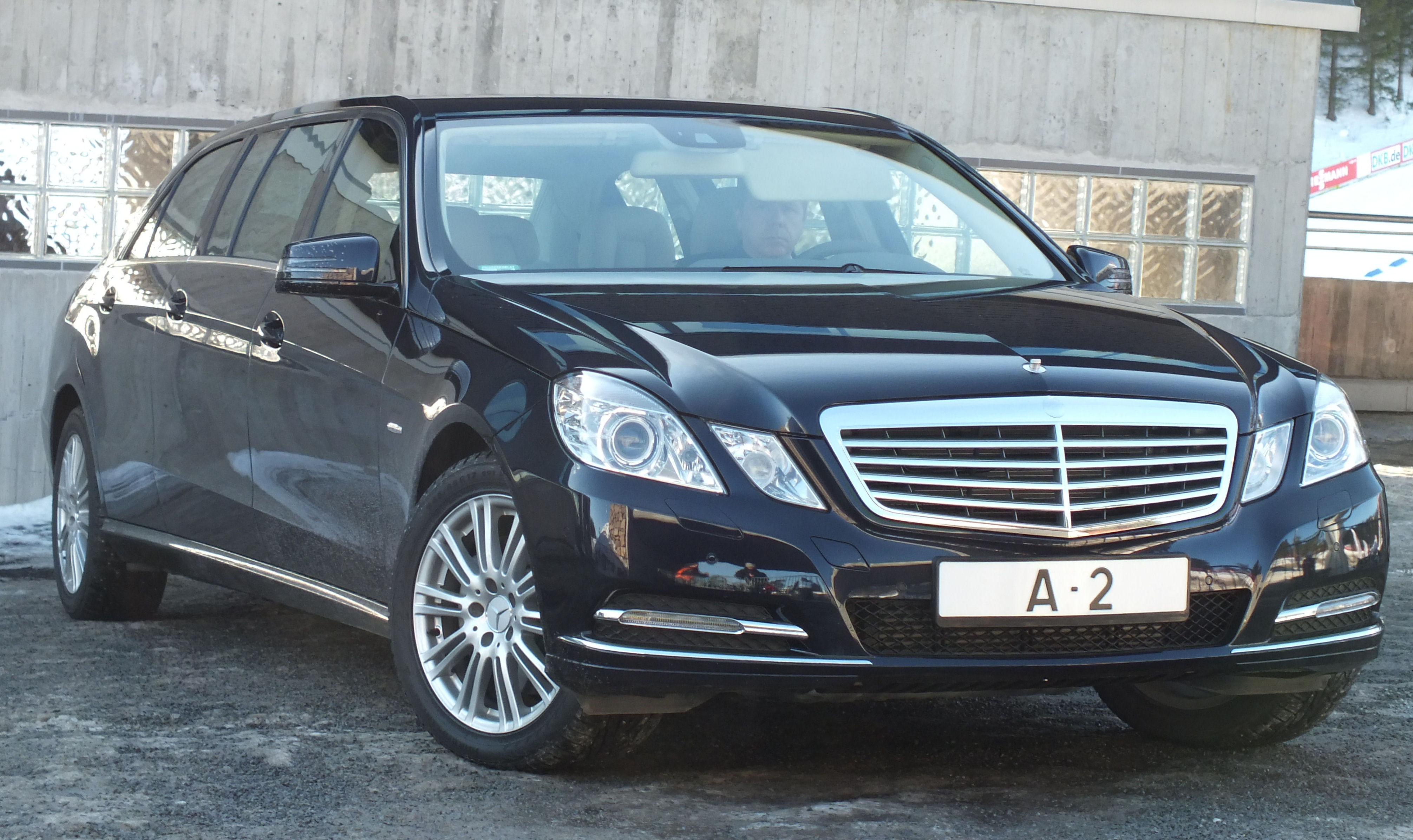 Binz limousin, en ombygd Mercedes e-klasse.